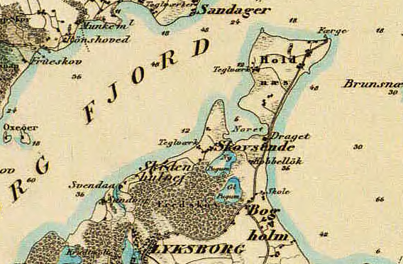 Generalstaben Videnskabernes Selskab: Kaart over Slesvigs Fastland og Als 4, østre blad, udsnit